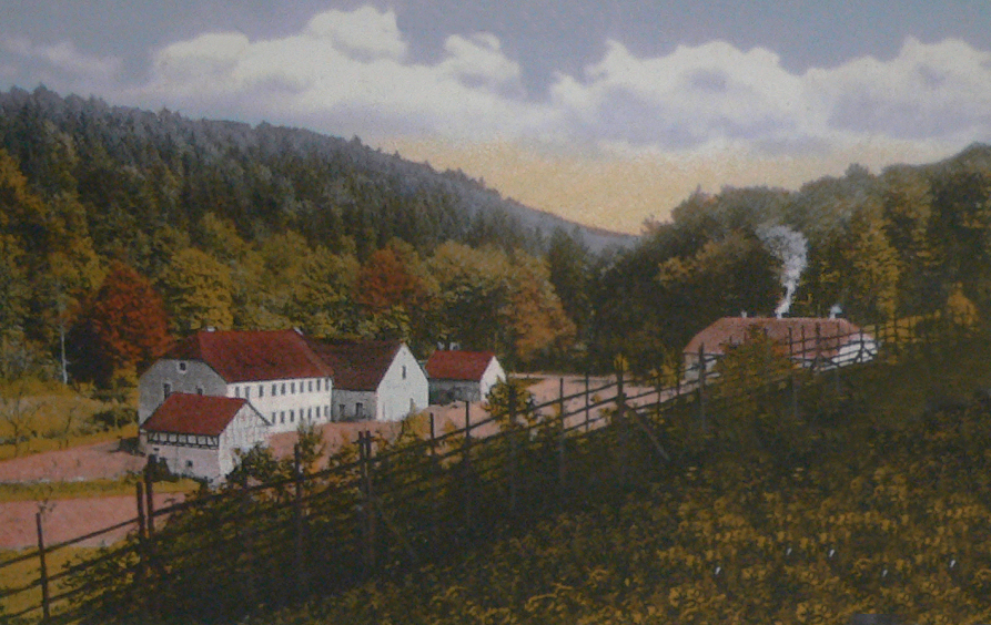 Glashütte Rottmünde der Familie Becker